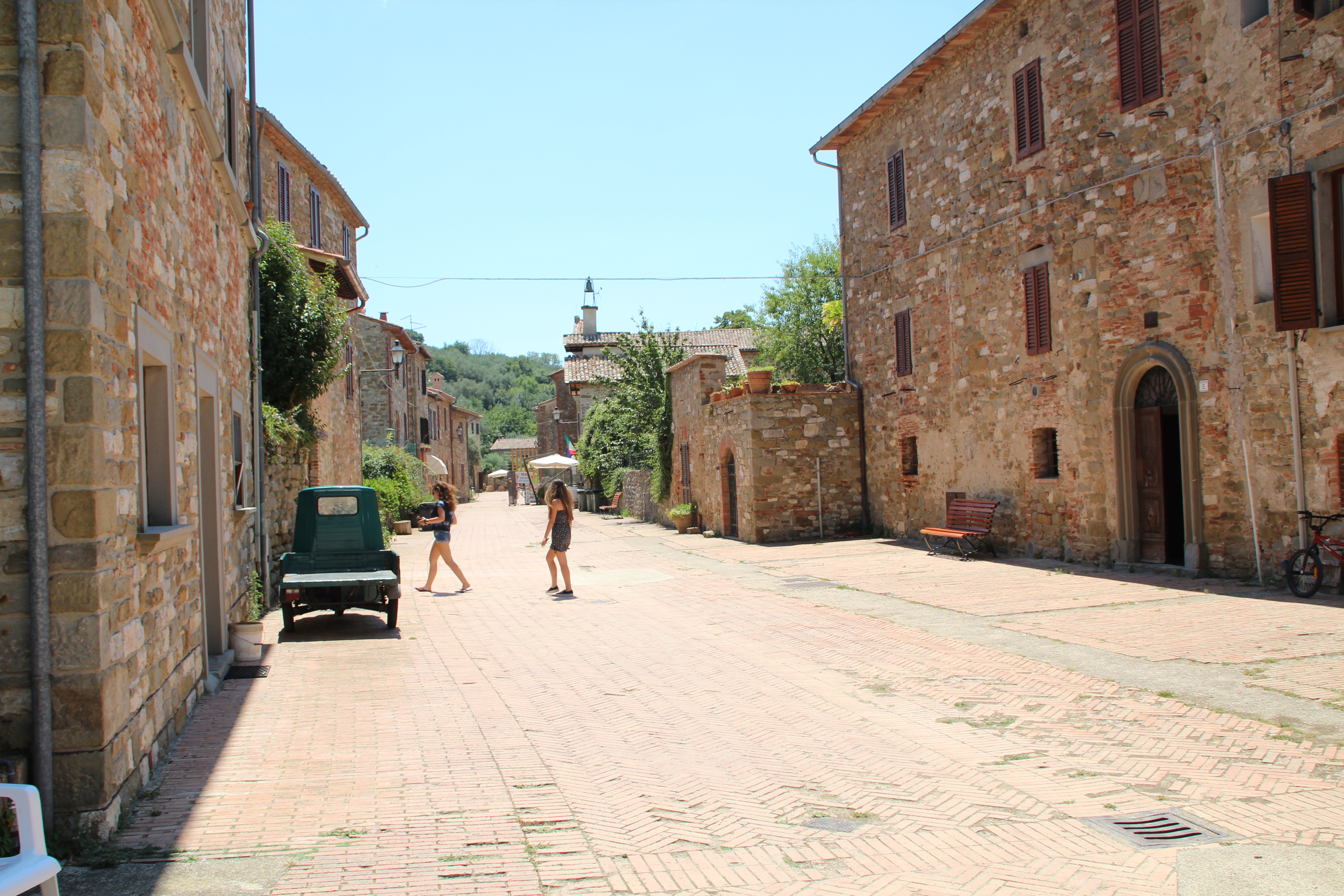 Isola Maggiore Via Guglielimi